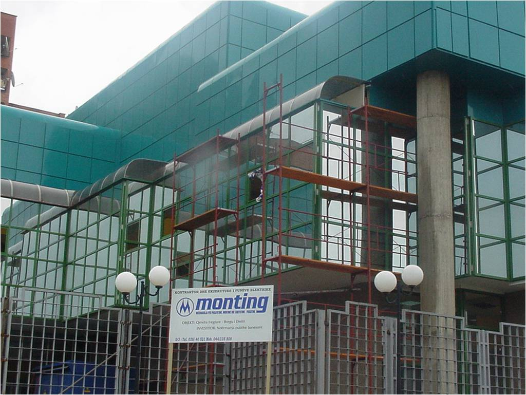 Ndermarrja Monting